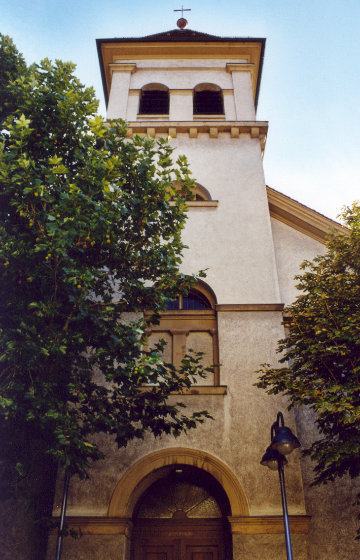 Die Vorderseite der Laurentiuskirche in Mannheim-Käfertal, erbaut 1817-22 im Weinbrenner-Stil nach Entwurf von Friedrich Dyckerhoff. Eine für Baden typische Kirche der Stilepoche des Klassizismus.